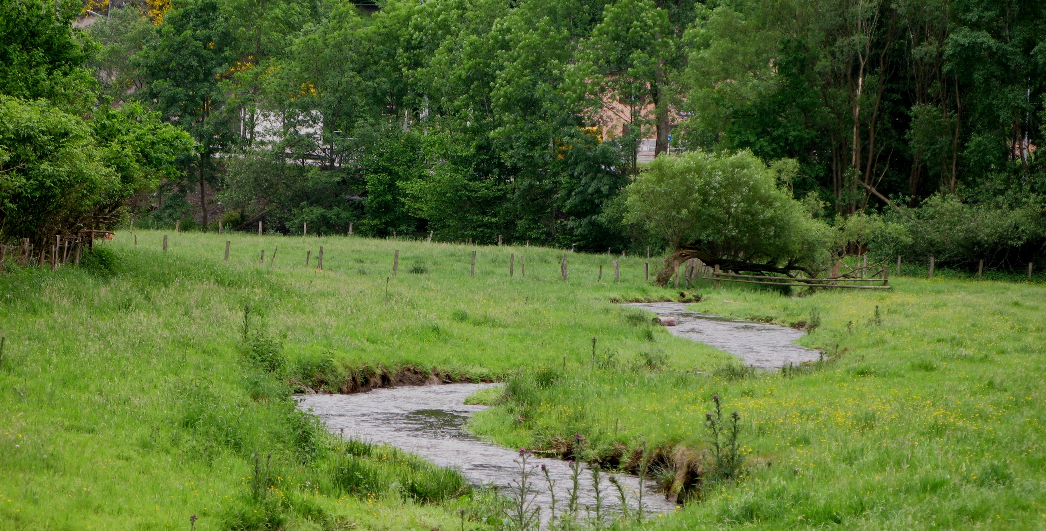 D'Wemperbaach op der Maulusmillen. Kategorie:Baachen zu Lëtzebuerg